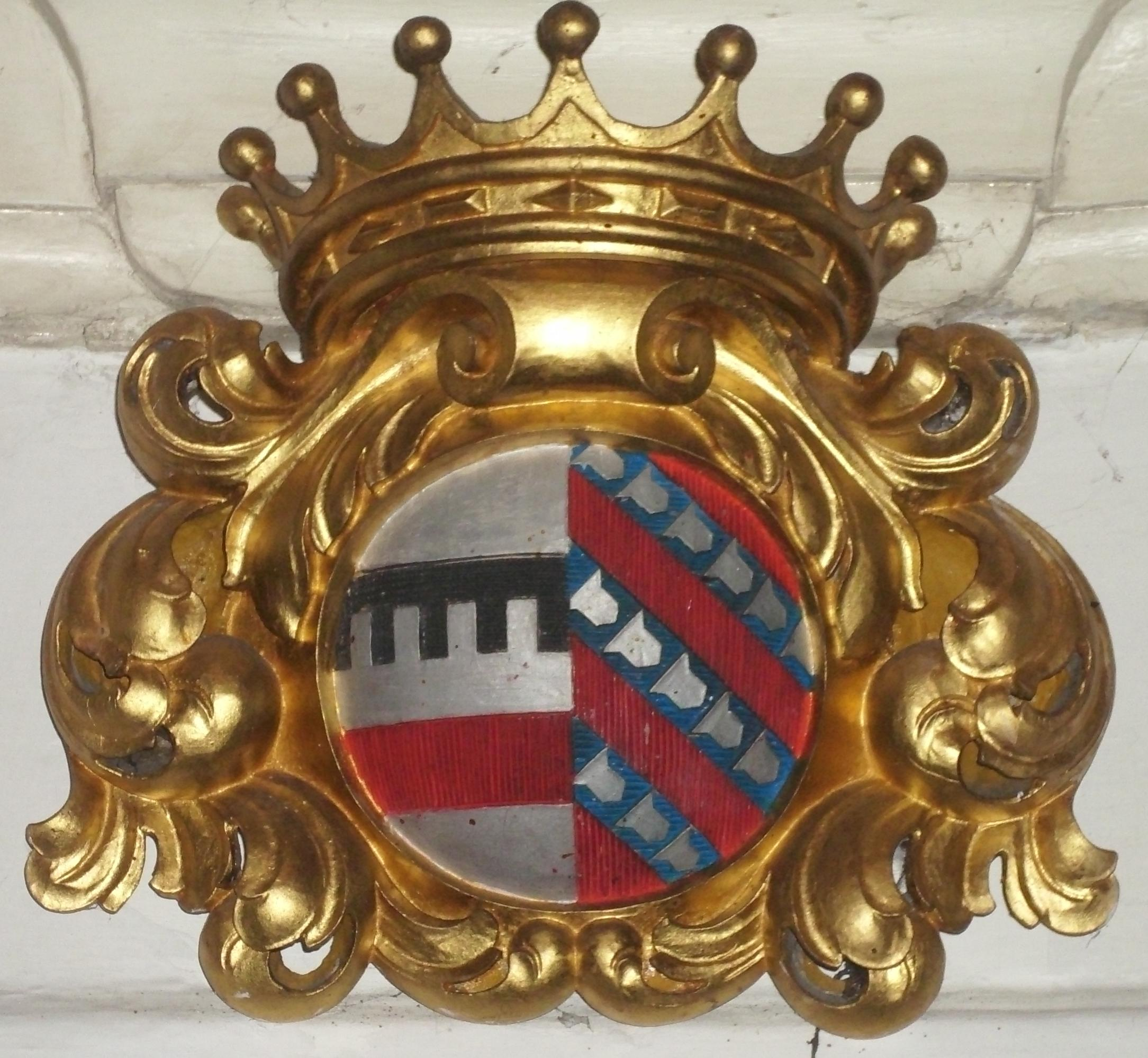 Familienwappen von Westphalen auf Schloss Laer